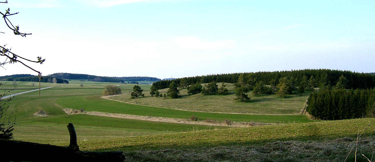 Albhochfläche auf dem Großen Heuberg.